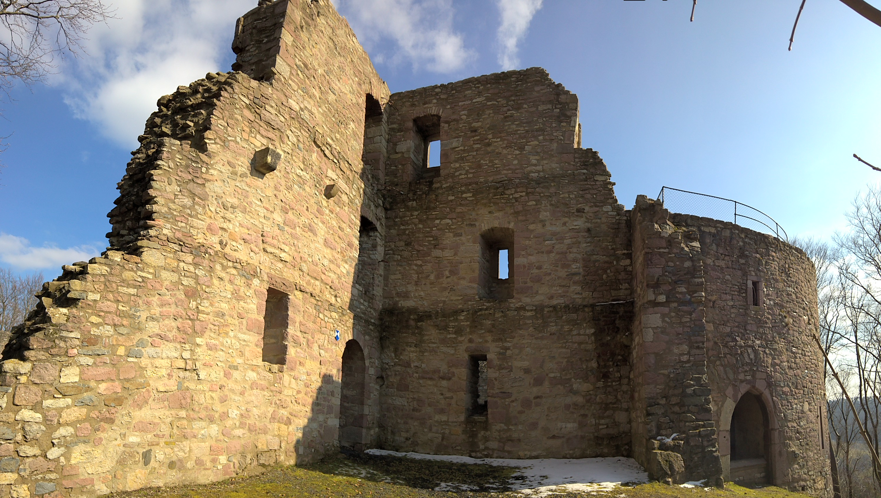 Burgruine Steckelberg bei Ramholz, Blick auf Rundturm und Reste des turmartigen Palas (Kemenatenbau)